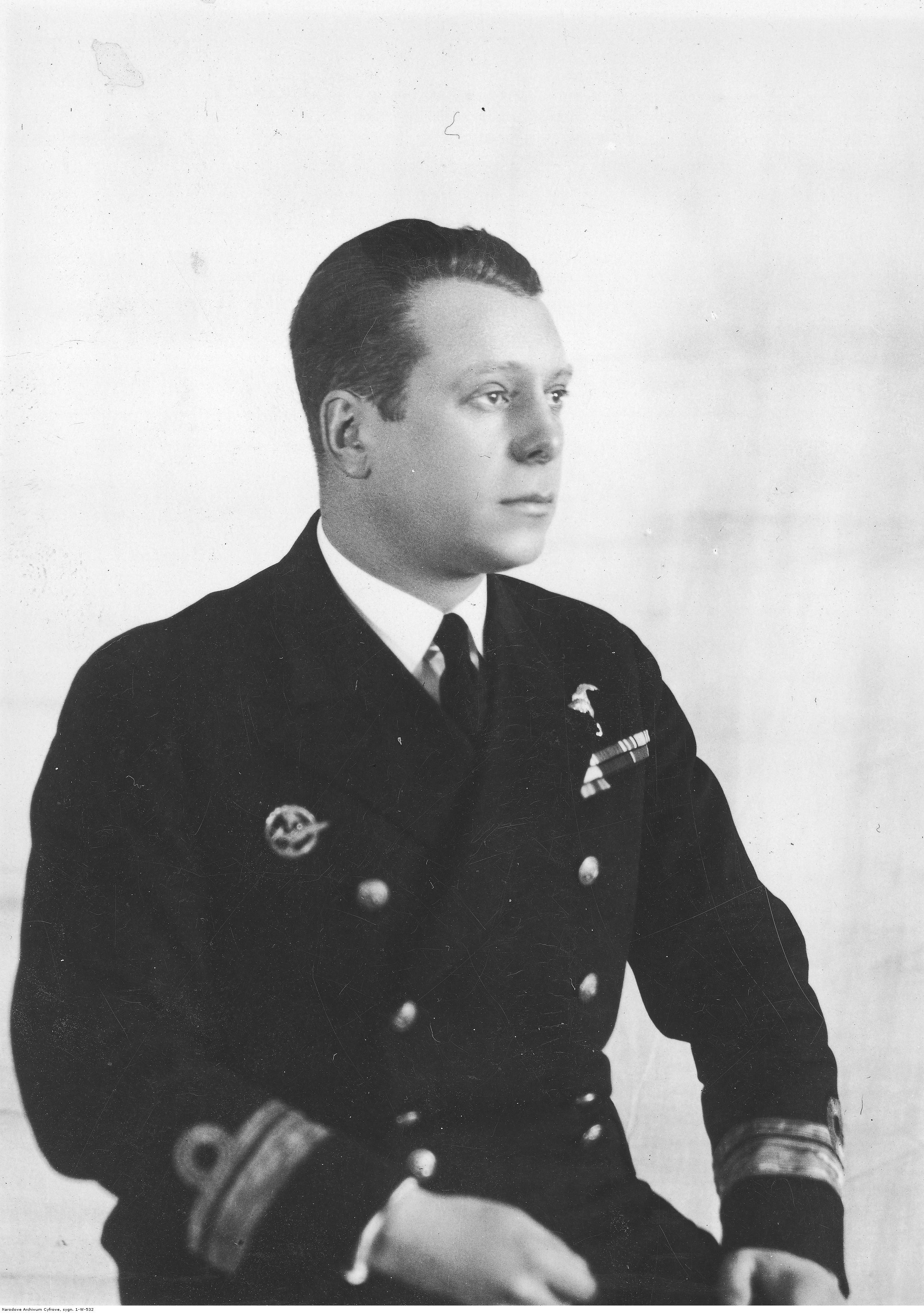 Edward Szystowski, komandor podporucznik, pilot.